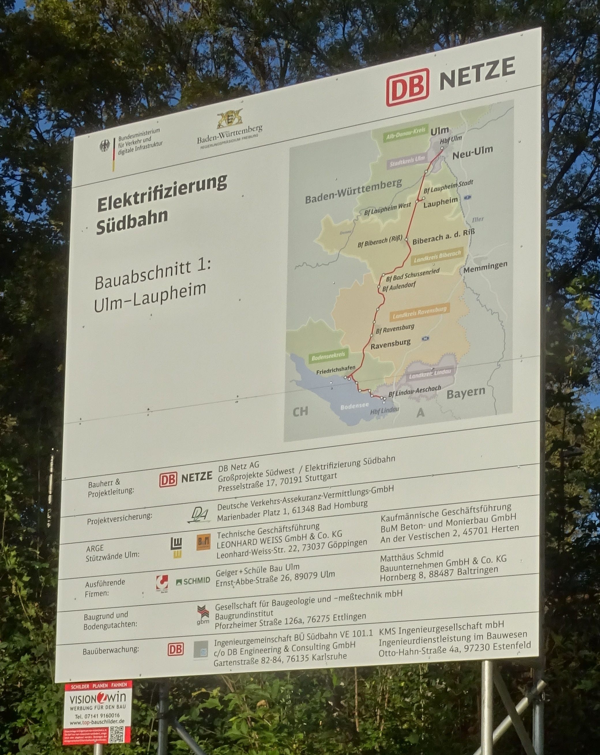 Bautafel in Ulm